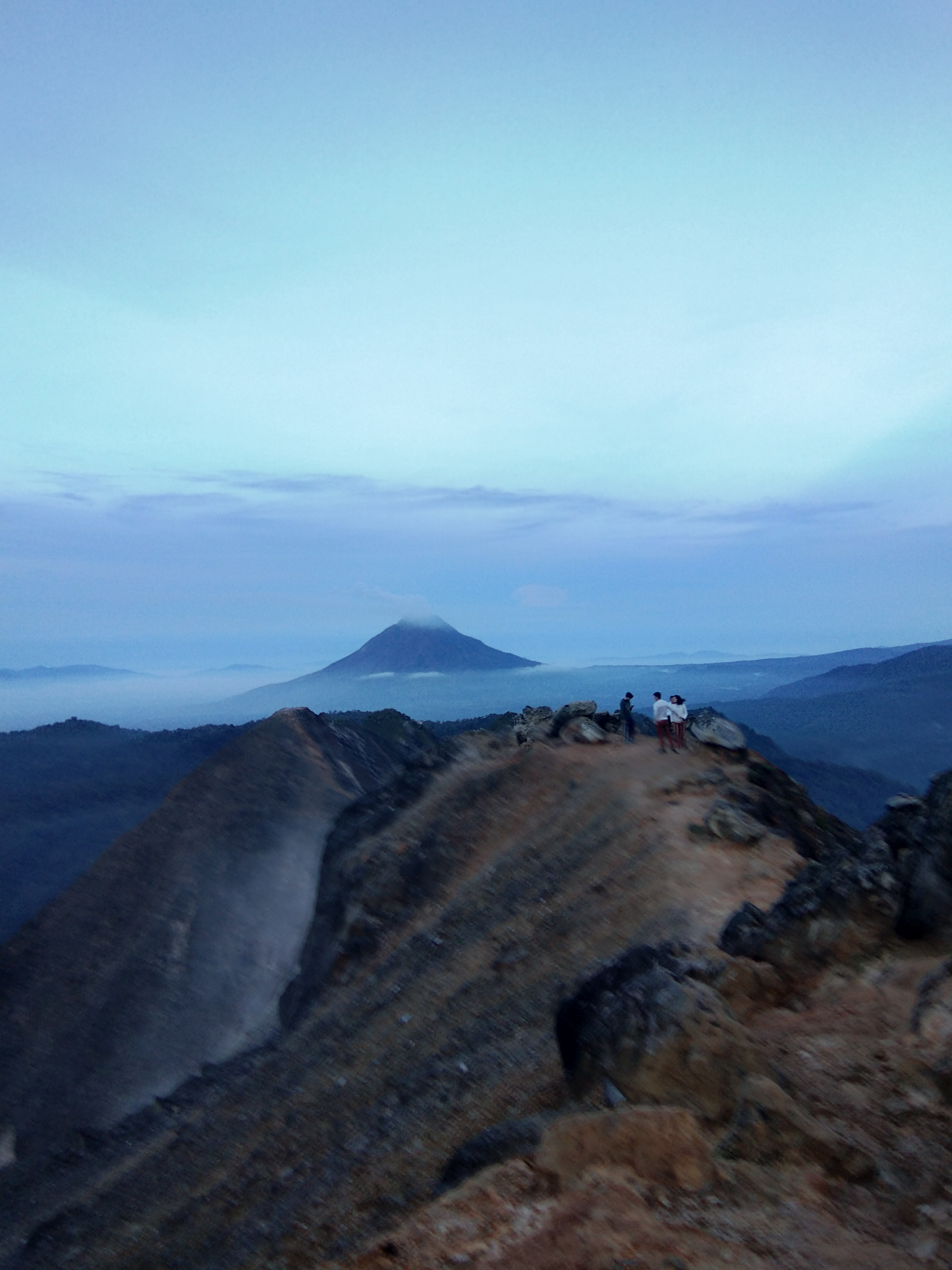 Gunung Sinabung dilihat dari Gunung Sibayak 2019, foto diambil pada saat terbit matahari